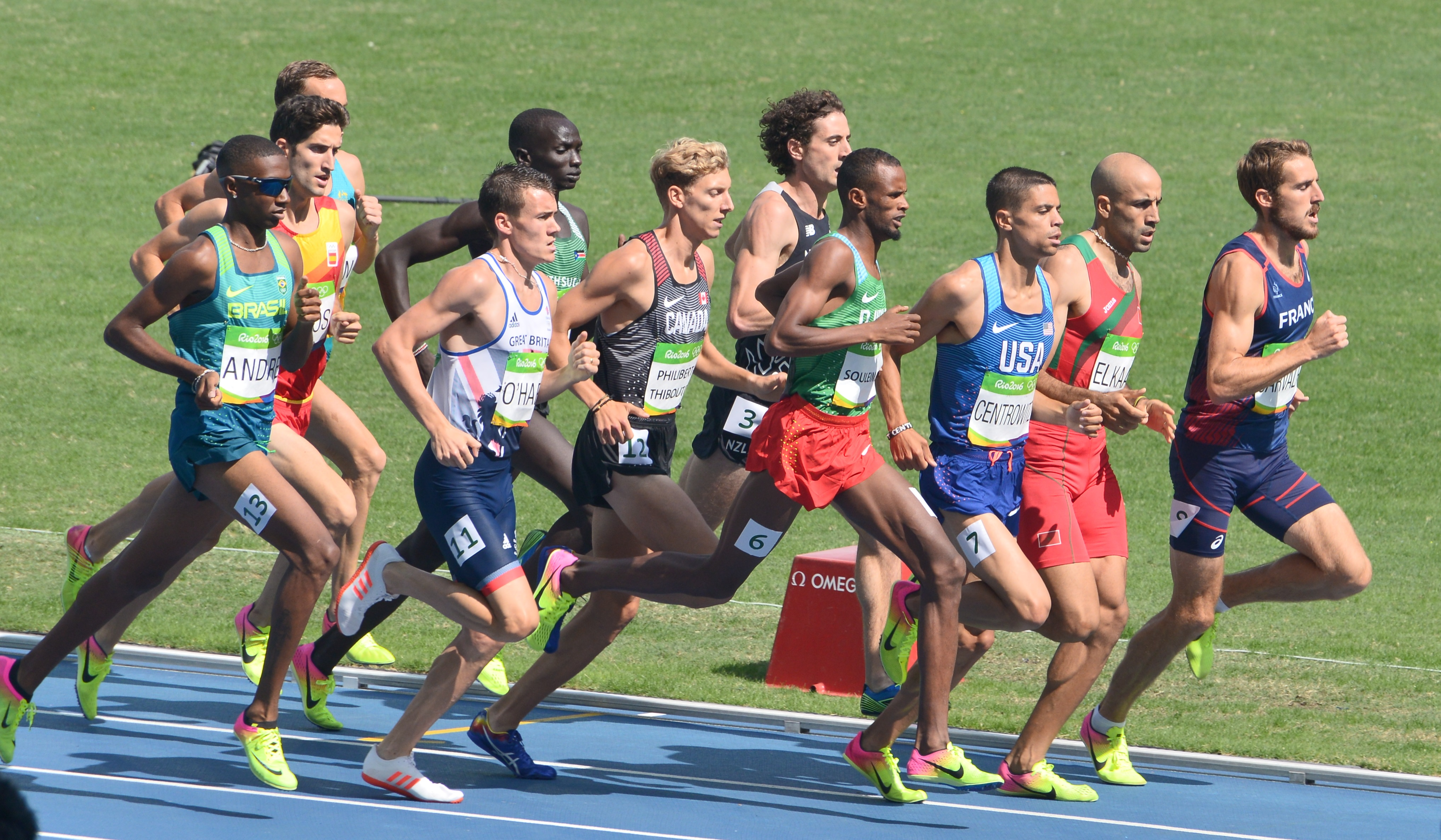 Matthew Centrowitz dans sa série du 1500m aux JO de Rio 2016